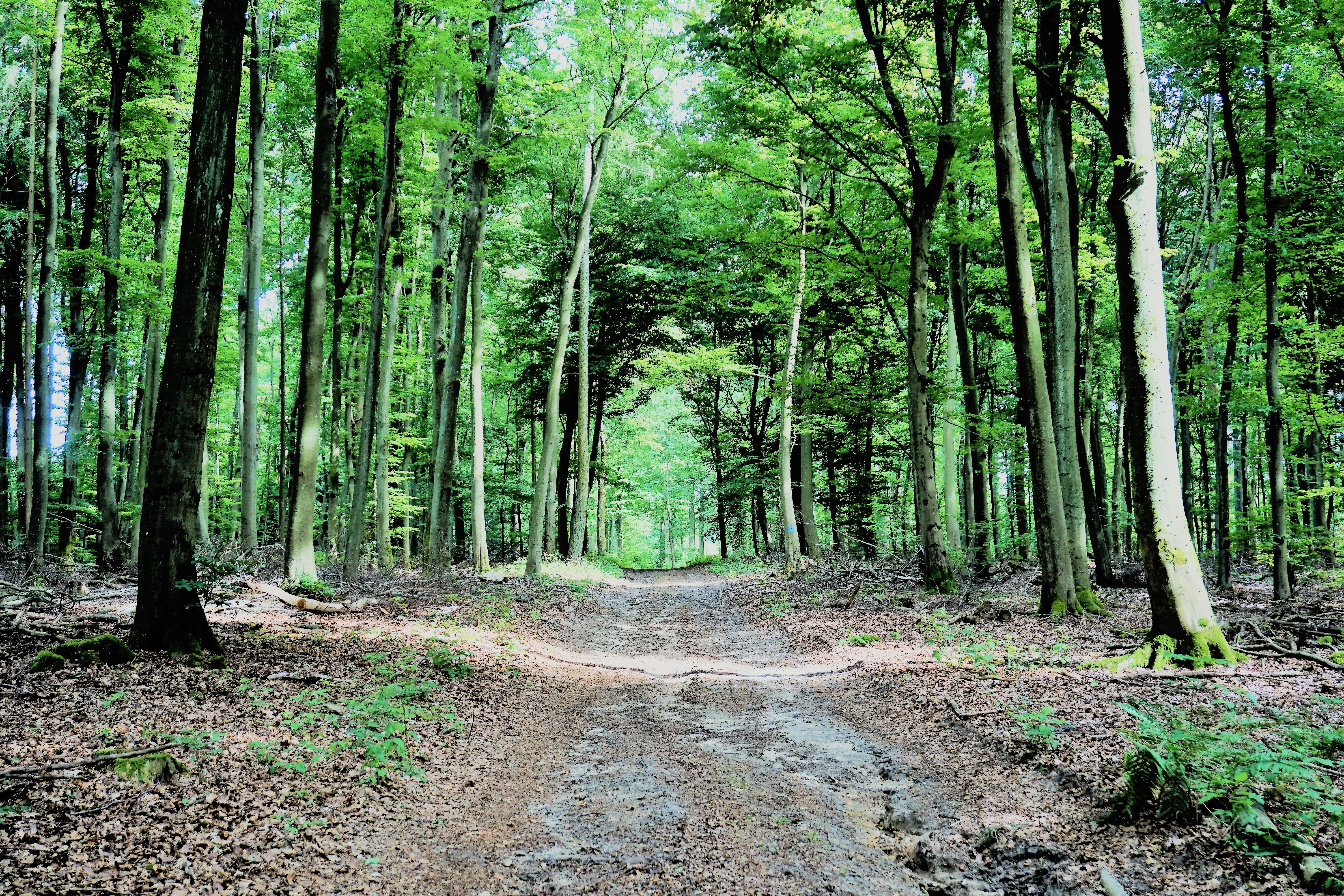 Steesel, de Kutschewee, südëstlech vum fréiere Geeschterhaischen am Gréngewald.